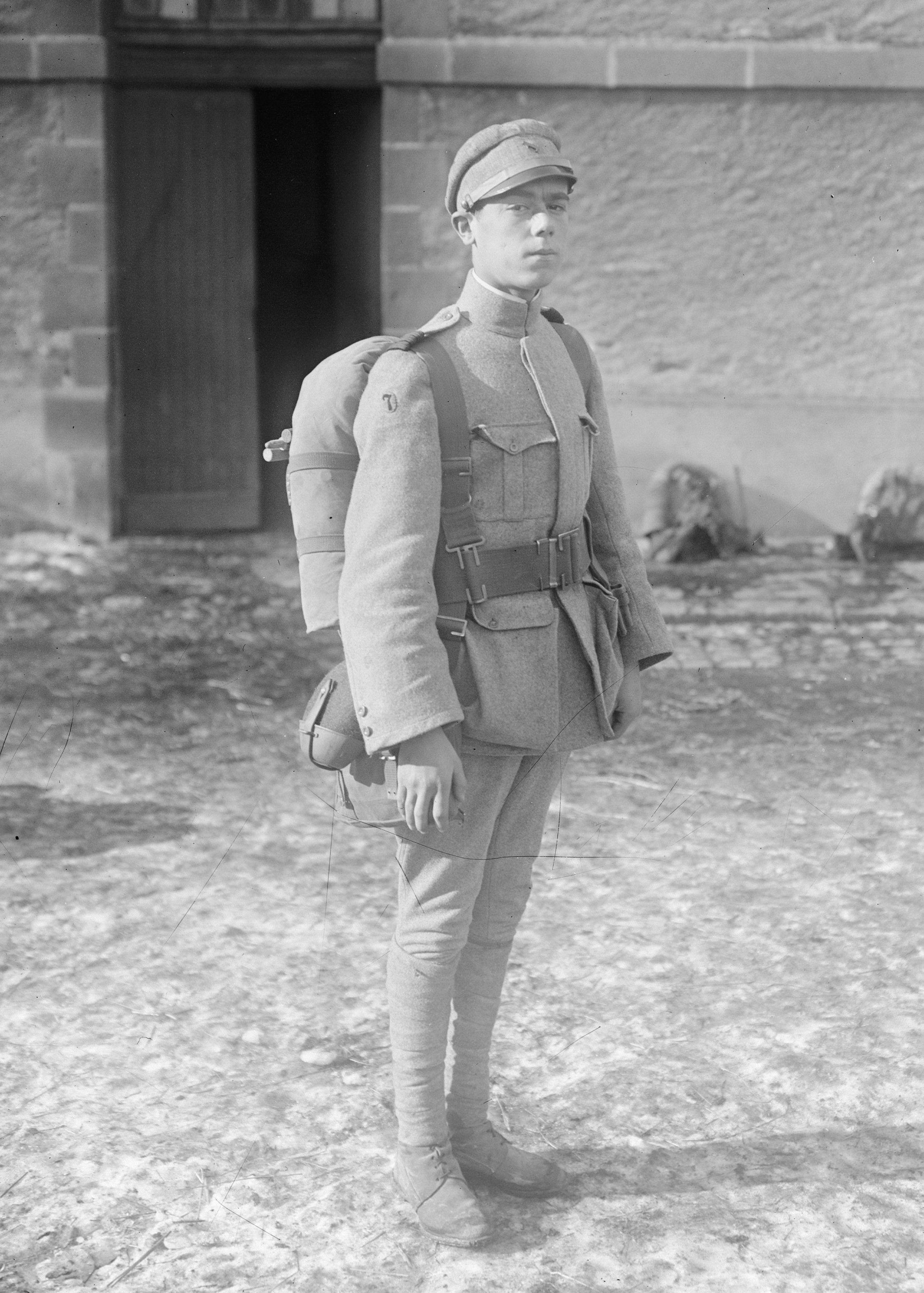 Débarquement des Portugais à Brest [1er contingent d'artillerie de la 1re division d'artillerie, un soldat posant.